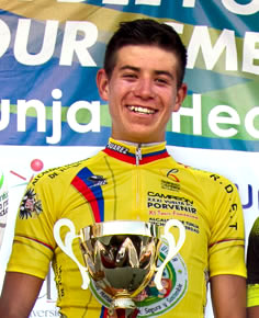 Julián Cardona ganador de la Vuelta del Porvenir 2015